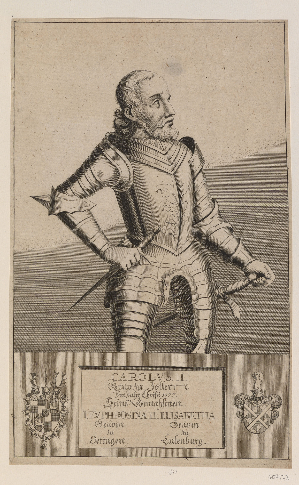 Charles II de Hohenzollern-Sigmaringen